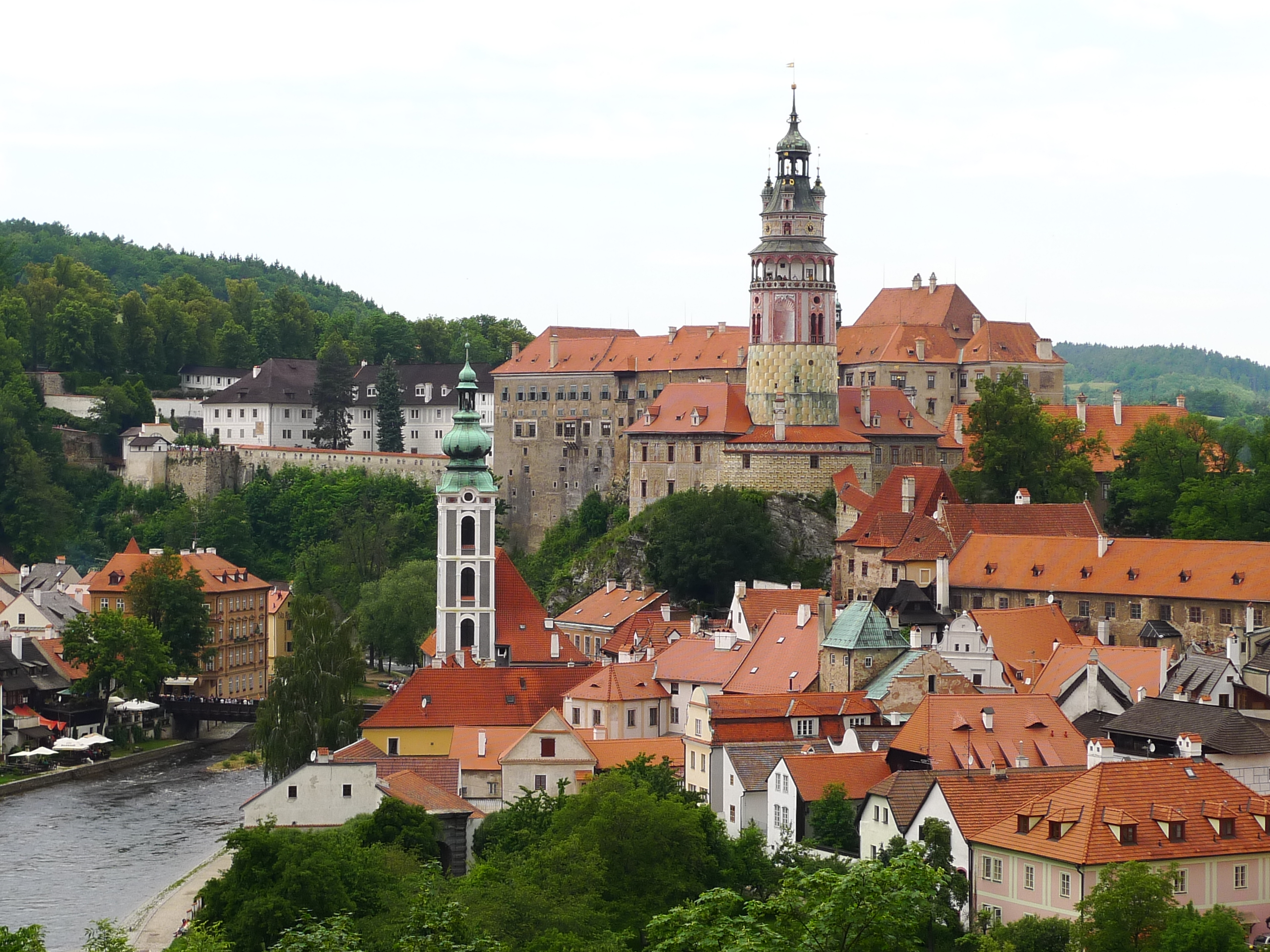 Zámek Český Krumlov, Latrán, na skalnatém ostrohu nad řekou Vltavou 46, Český Krumlov